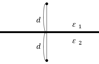 평면으로 주어지는 선형 유전체 경계면에서의 영상법